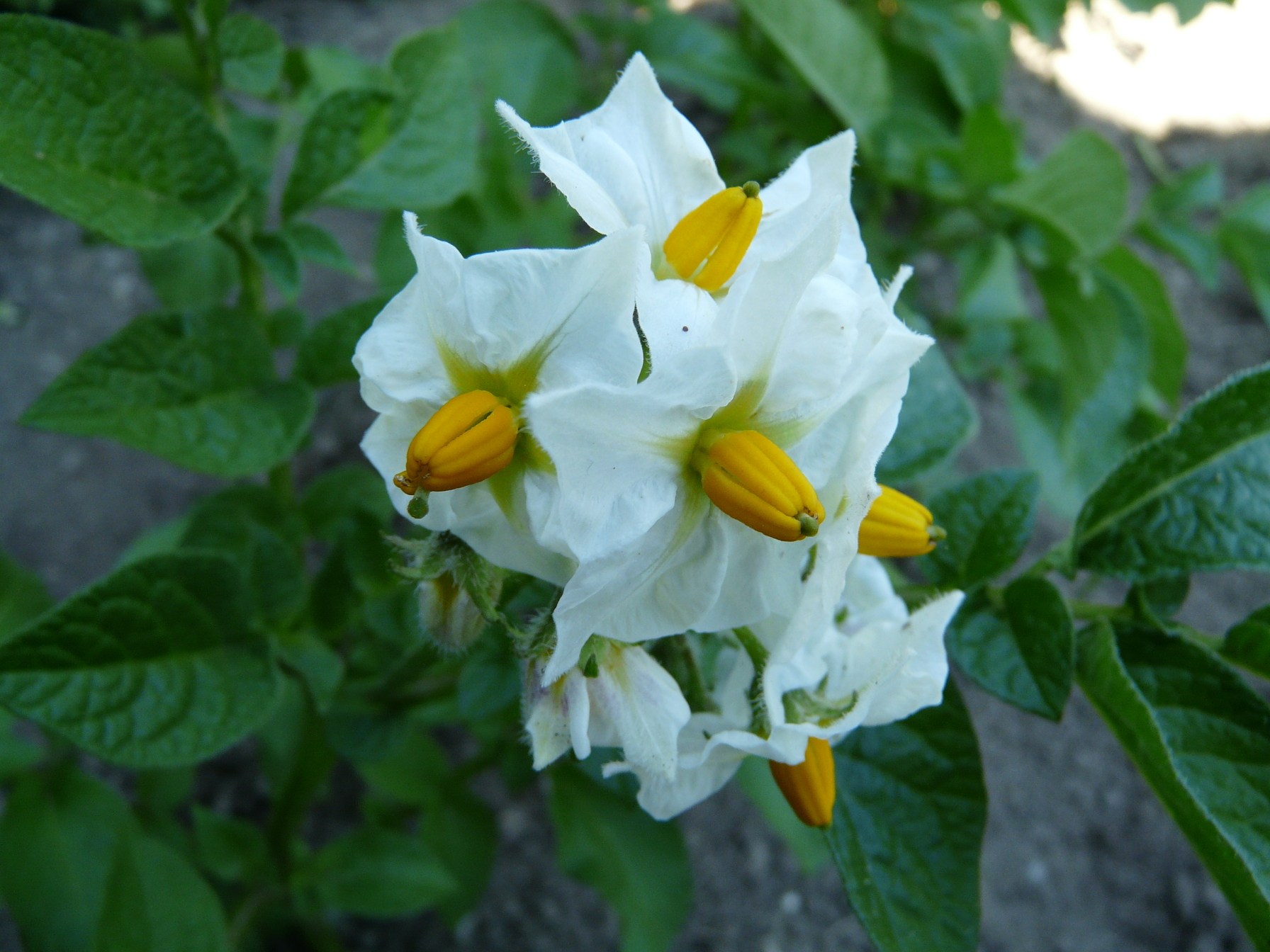 Fleurs de pomme de terre (variété Apollo)